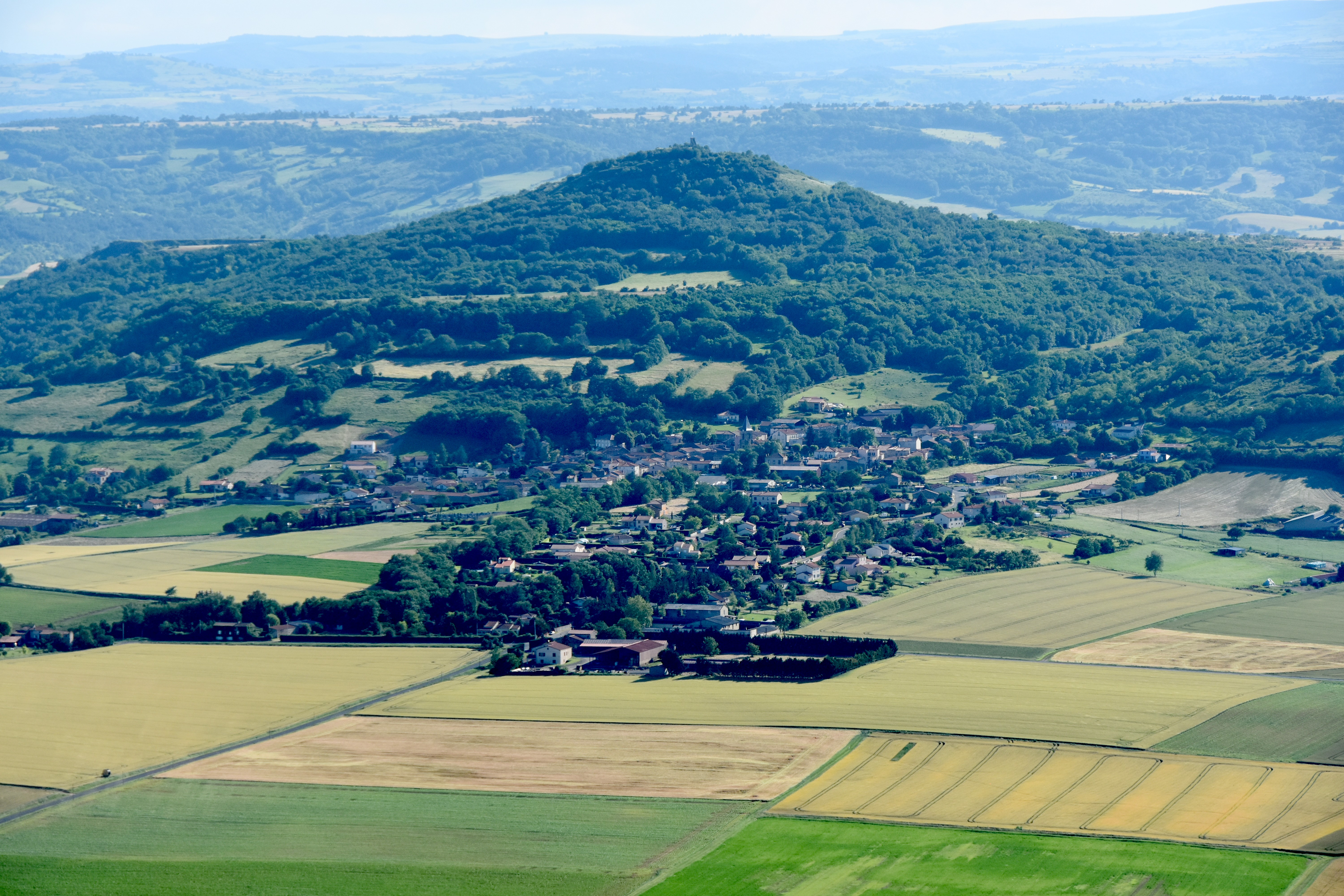 Vue aérienne de Vichel depuis le nord-est.